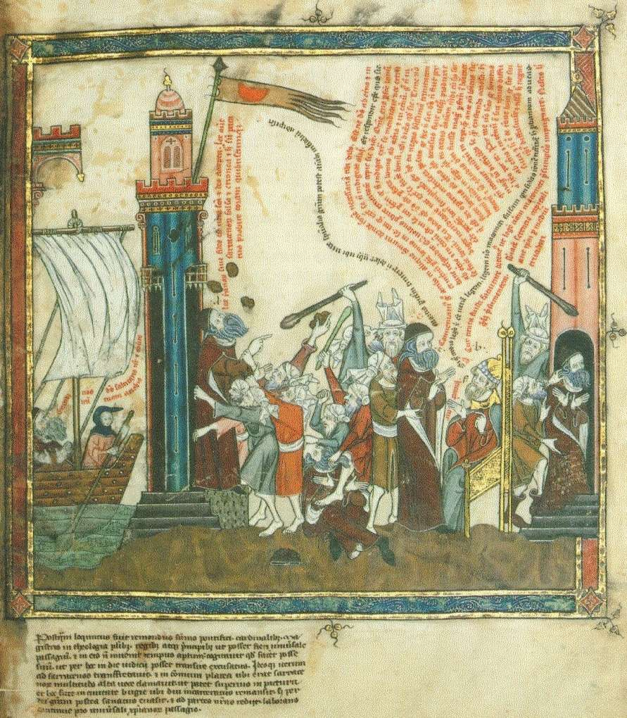 Ramon Llull lapidat a mort al nord d'Africa